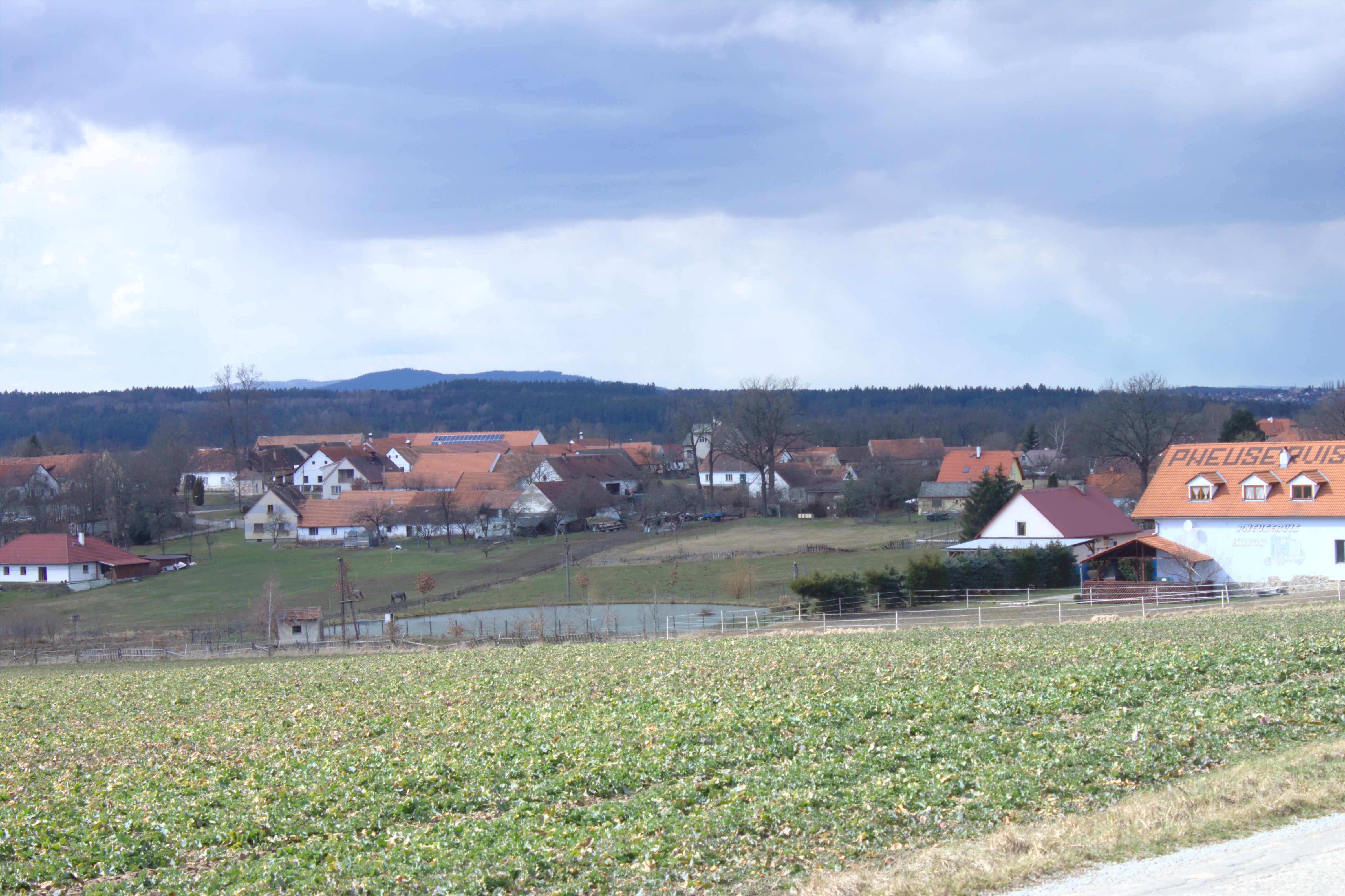 Pohled na obec ve vesnici Branišovice Project: Fotíme Česko